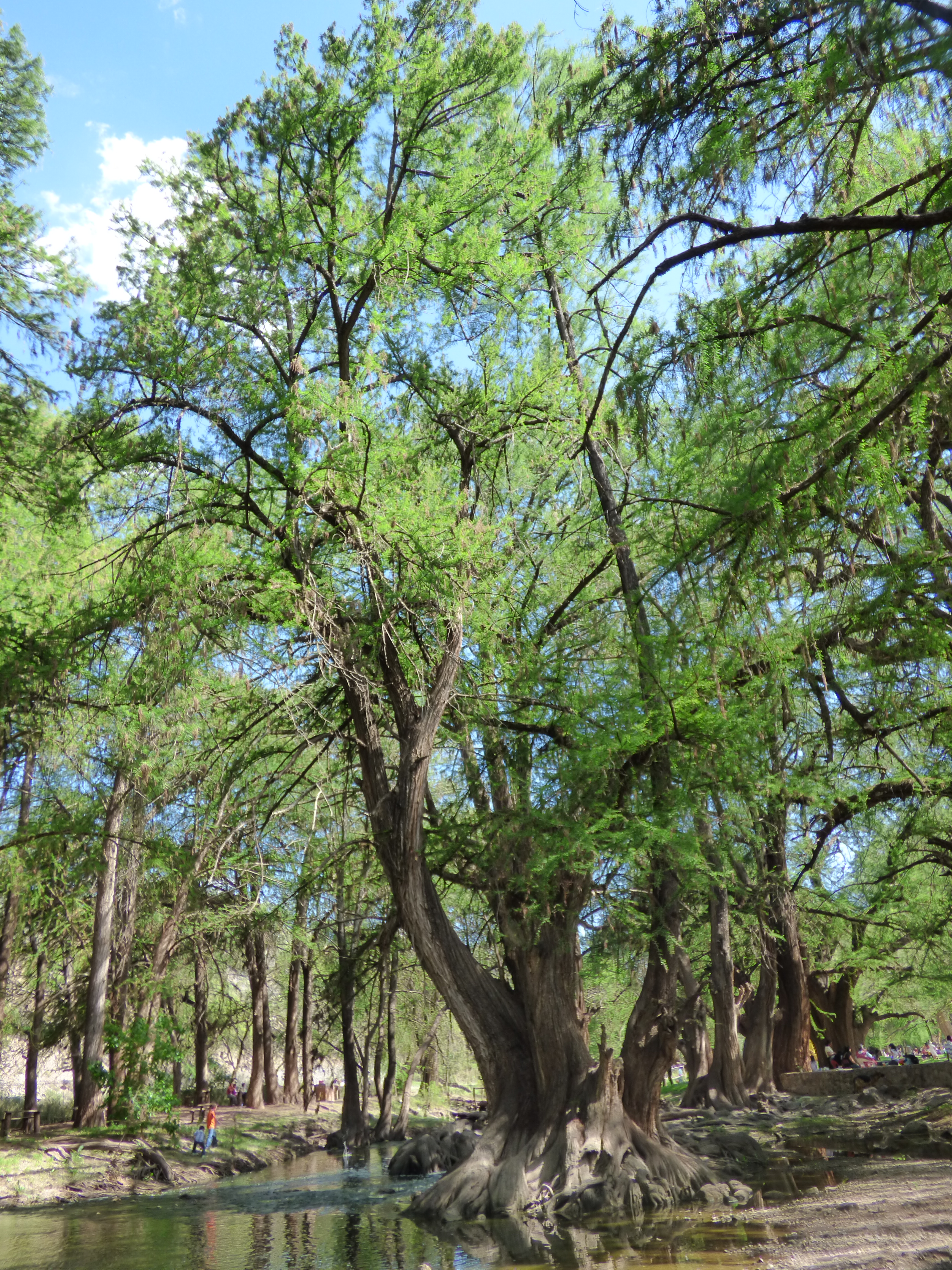 El Sabinal, Salto de los Salado, Aguascalientes